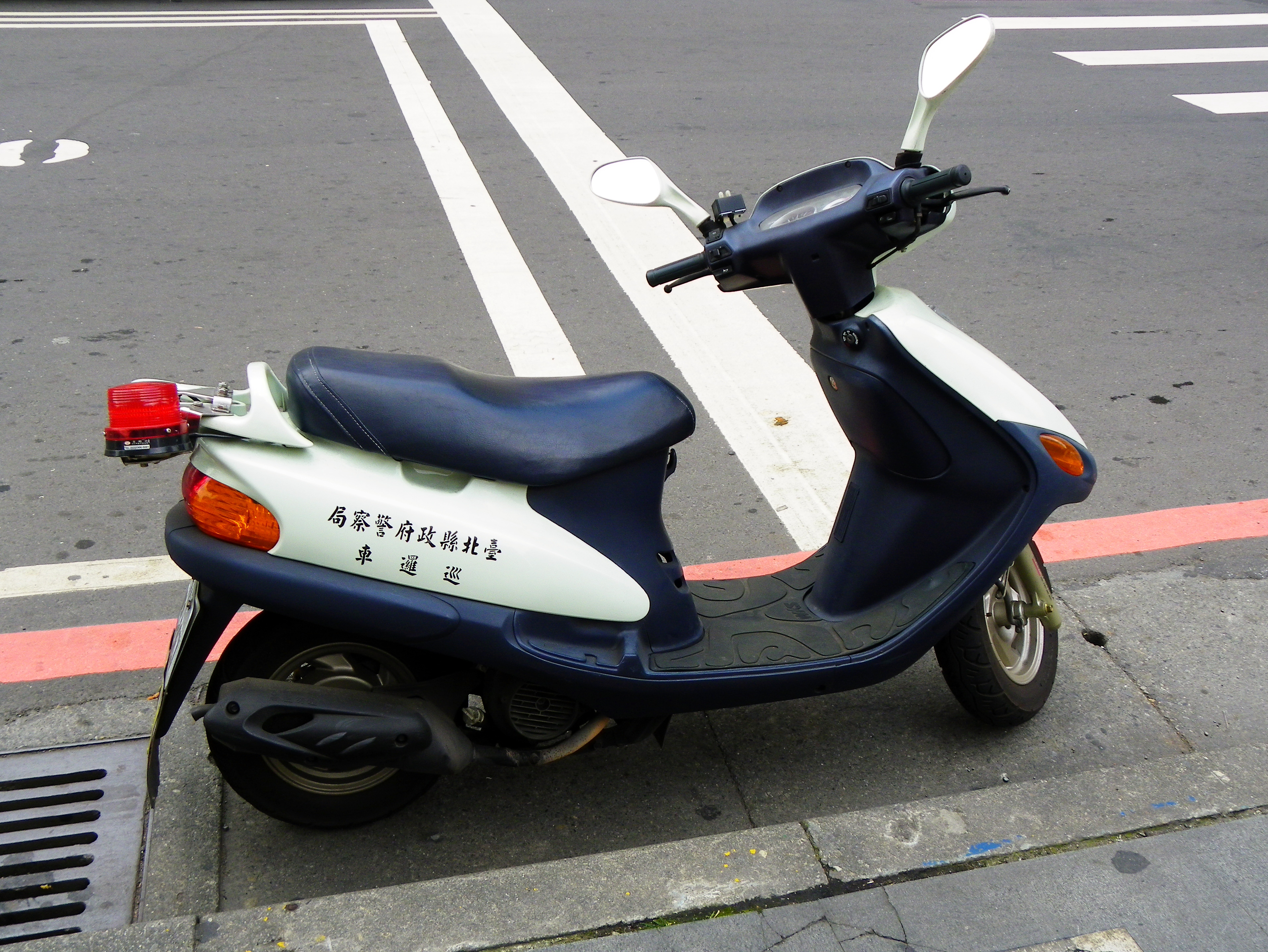 臺北縣政府警察局三陽GY6系列速克達巡邏車，攝於臺北縣新店市臺北捷運新店線大坪林站1號出口前。